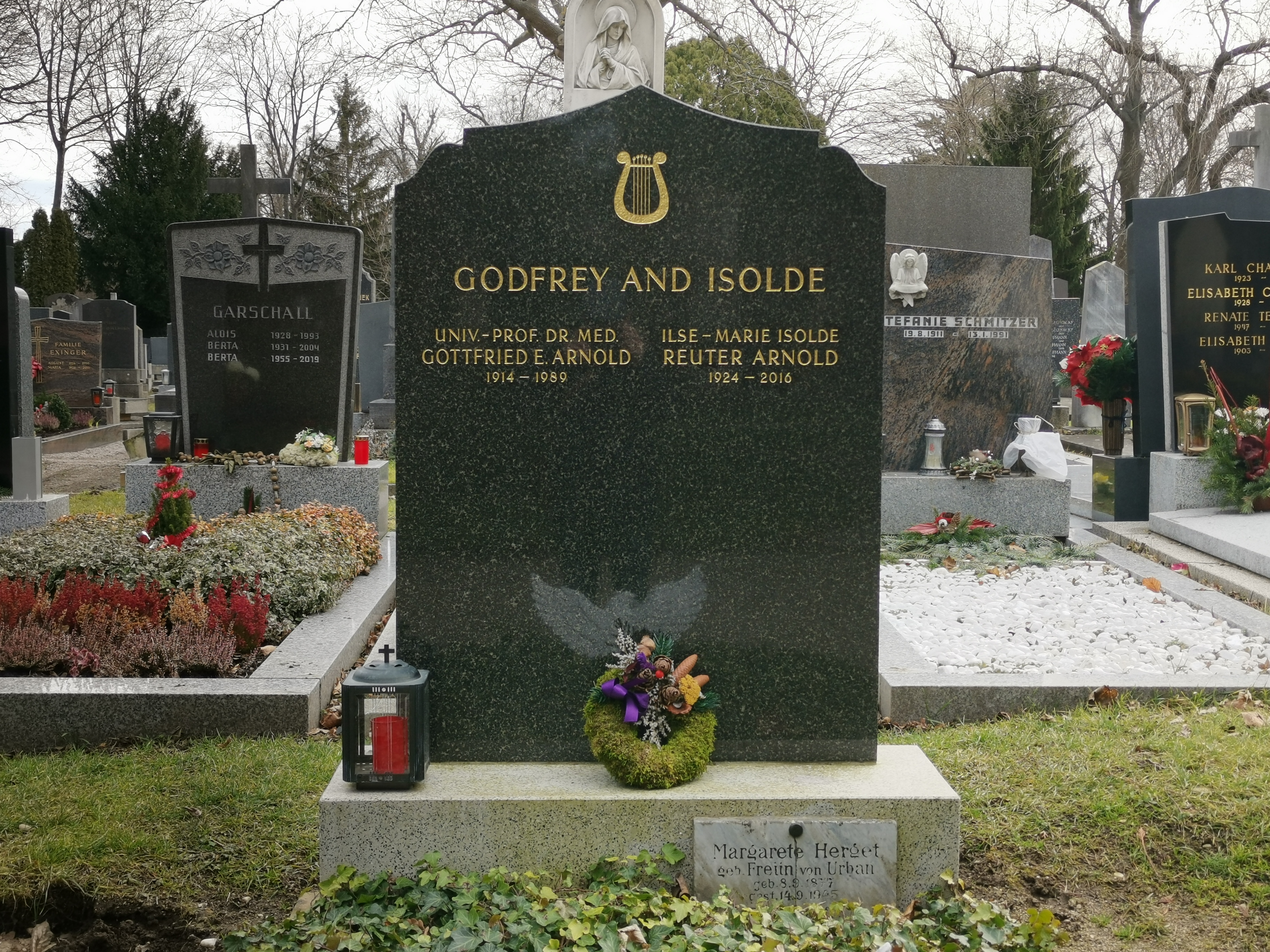 Grab von Prof. Gottfried Eduard Arnold auf dem Wiener Zentralfriedhof